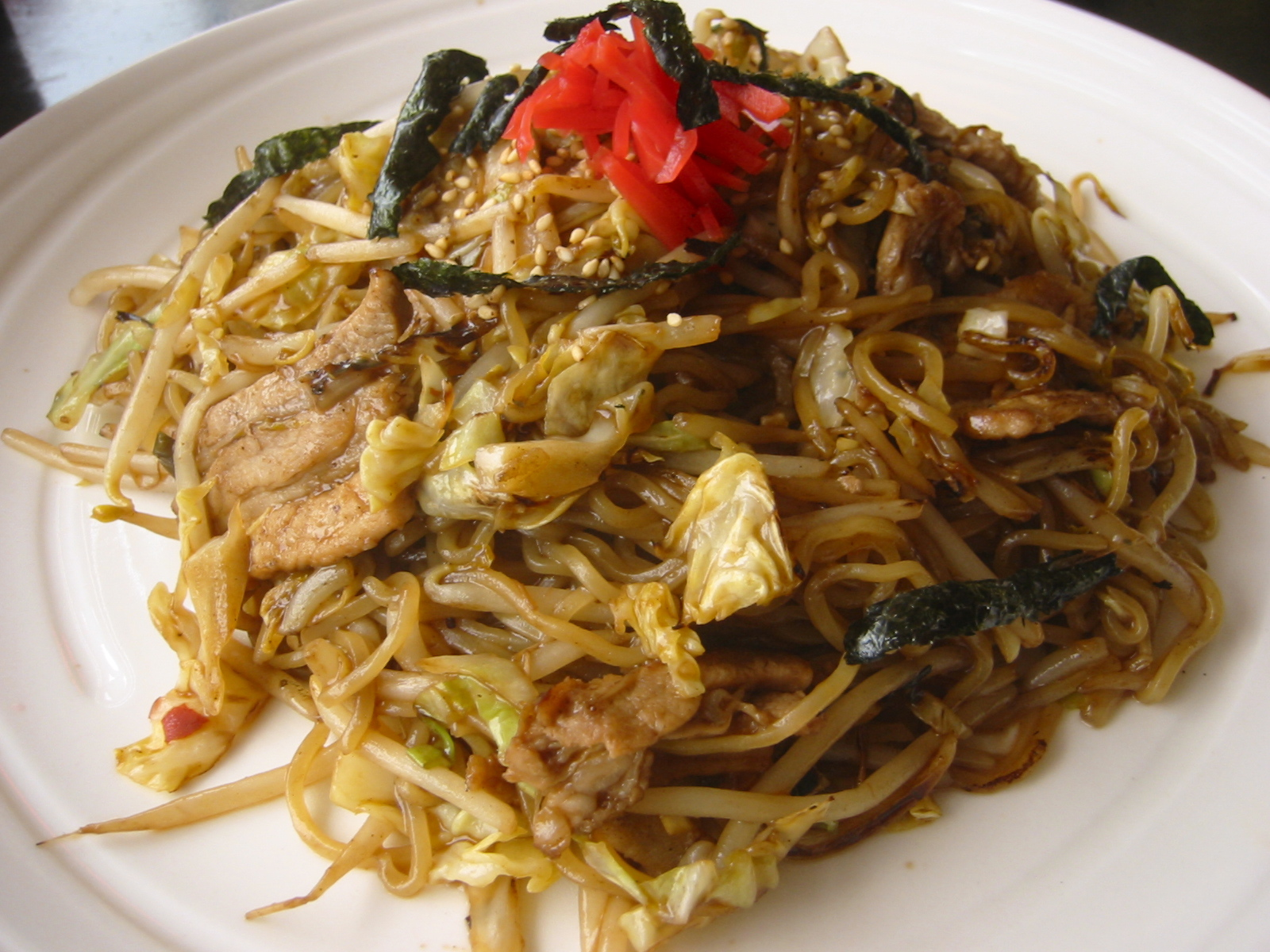 Yakisoba.